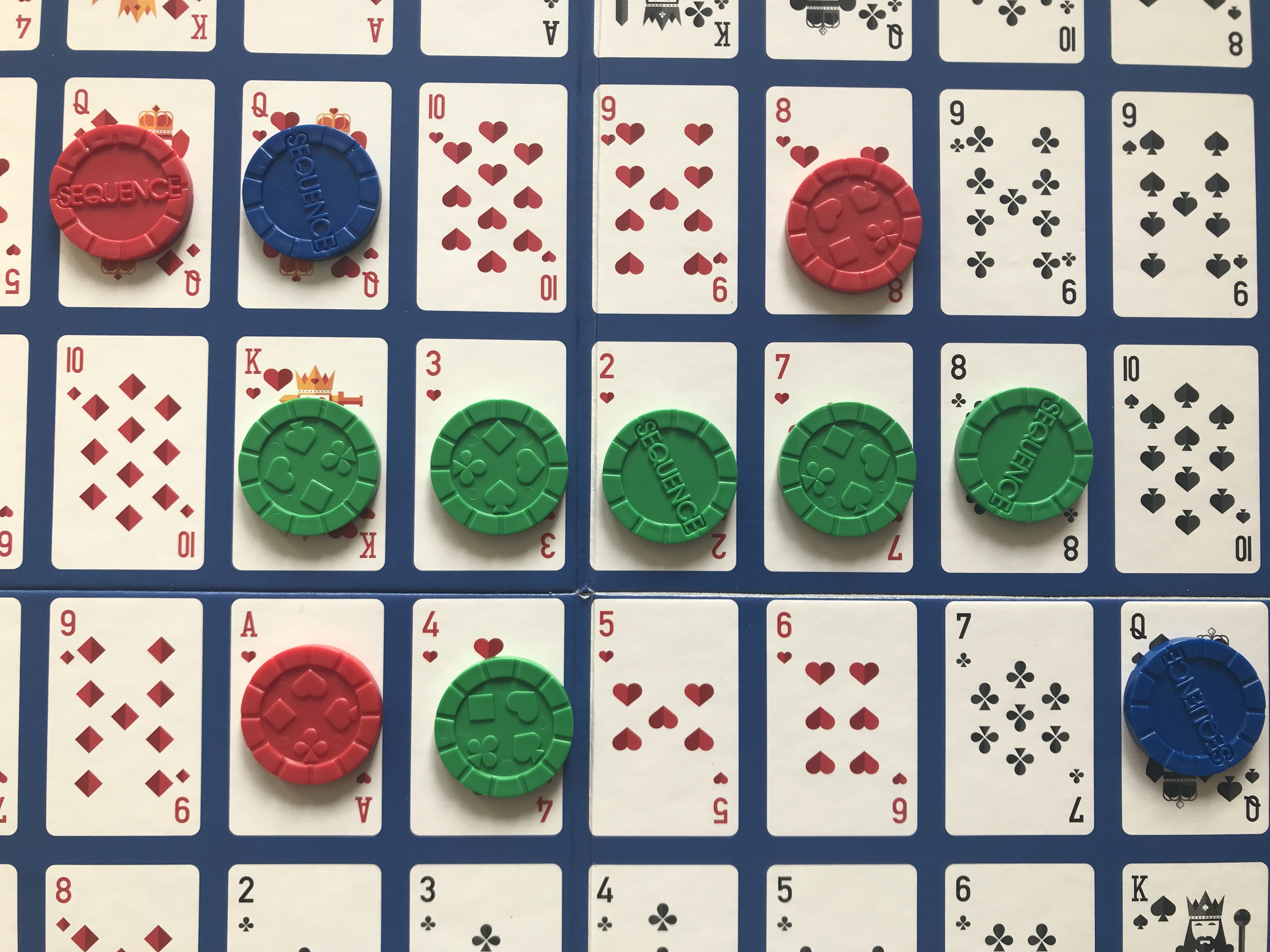 Spielmaterial für Sequence